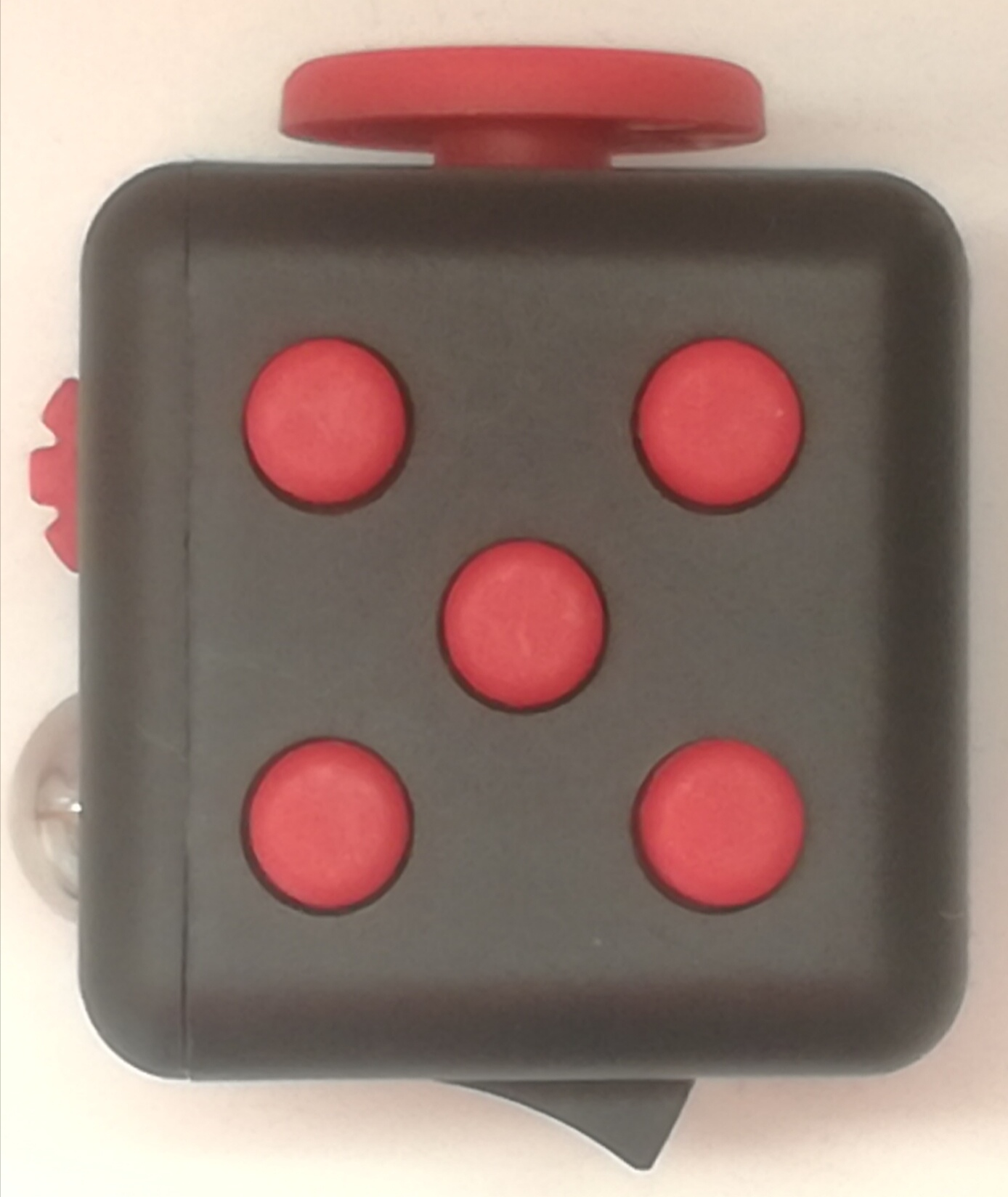 Fidget cube rosso e nero